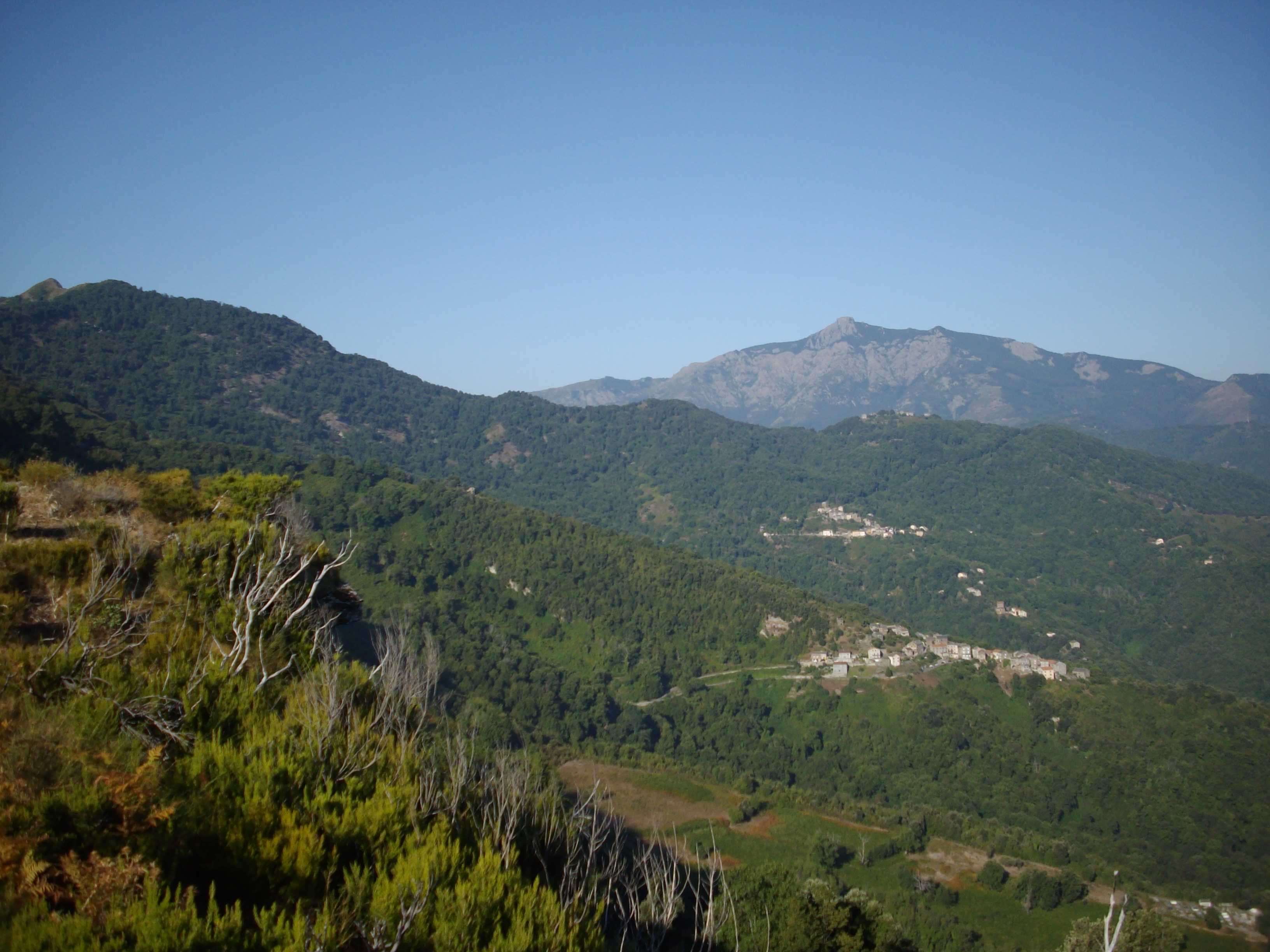 Pruno devant Poggio et Olmo de la commune de San-Gavino-d'Ampugnani, et le Monte San Petrone, pris depuis les crêtes du Mont Taglio.